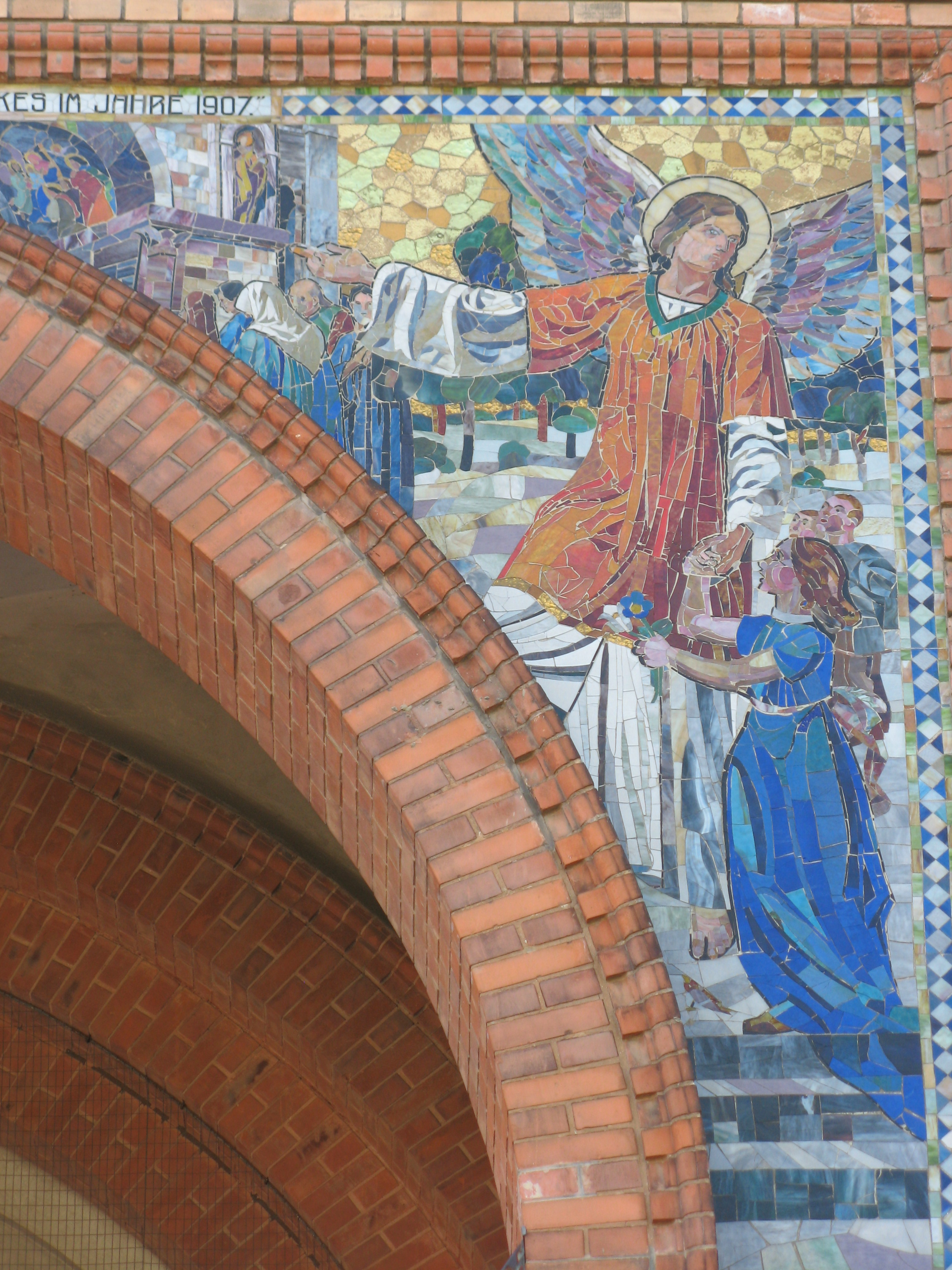 Schutzengel-Mosaik (1907) am Hauptportal der Antonskirche, Antonsplatz, Wien-Favoriten